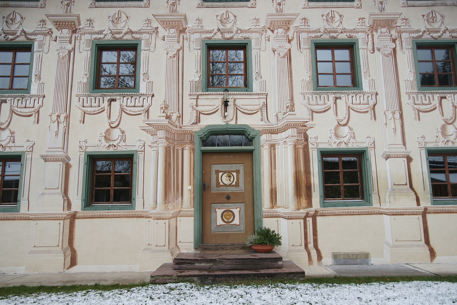 Bauernhaus, Schwesternhaus Fassade